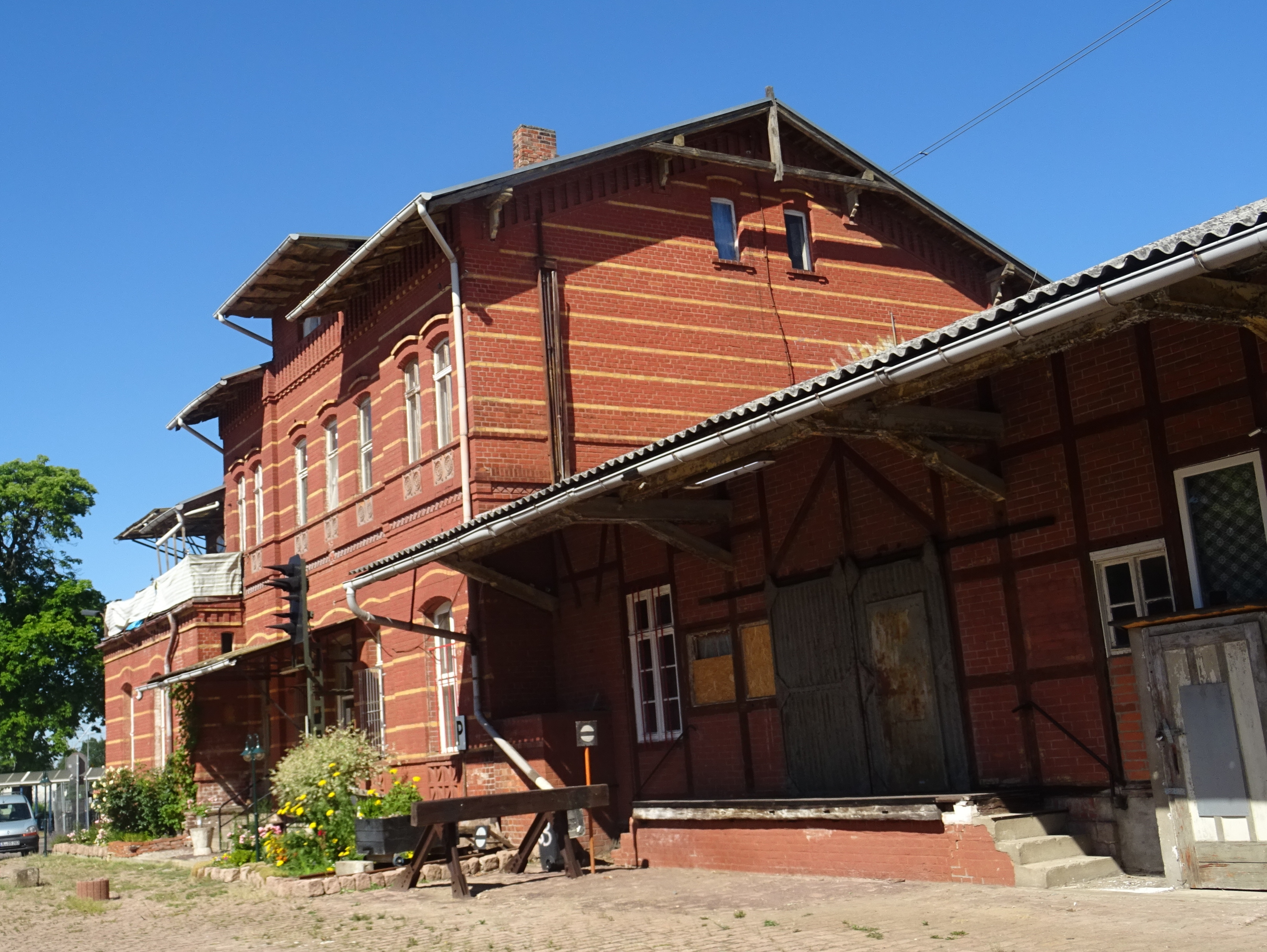 Bahnhof Güsen, denkmalgeschütztes Empfangsgebäude des früheren Staatsbahnhofs